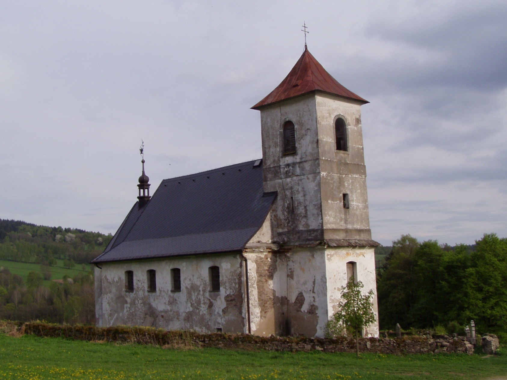 Kostel sv. Jana Nepomuckého ve Vrchní Orlici - 2015